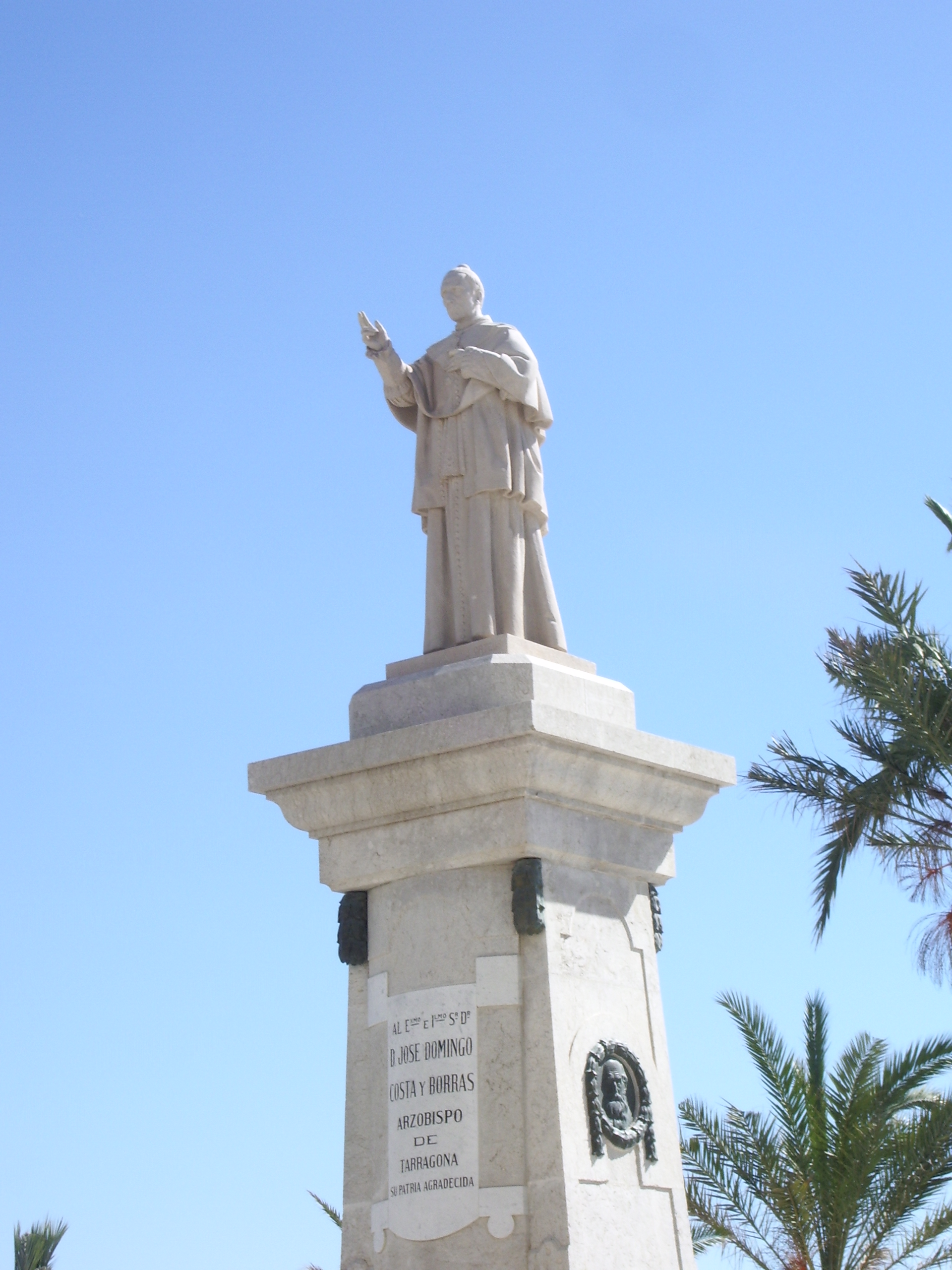 Costa i Borras